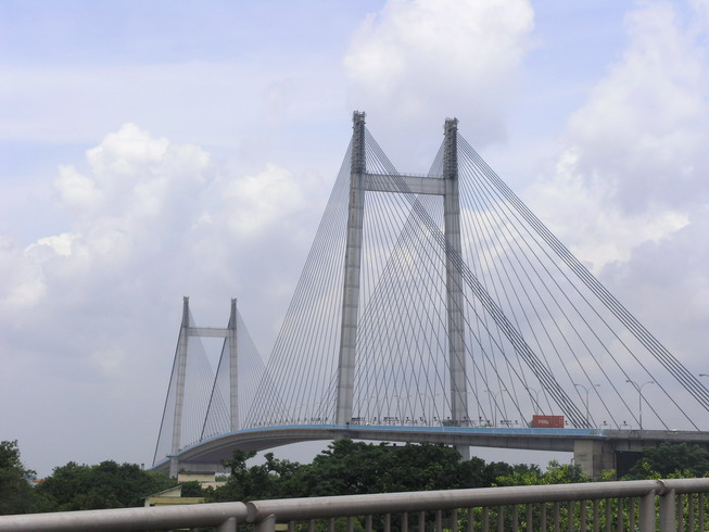 Vidyasagar Setu in Kolkata (Calcutta), West Bengal, India